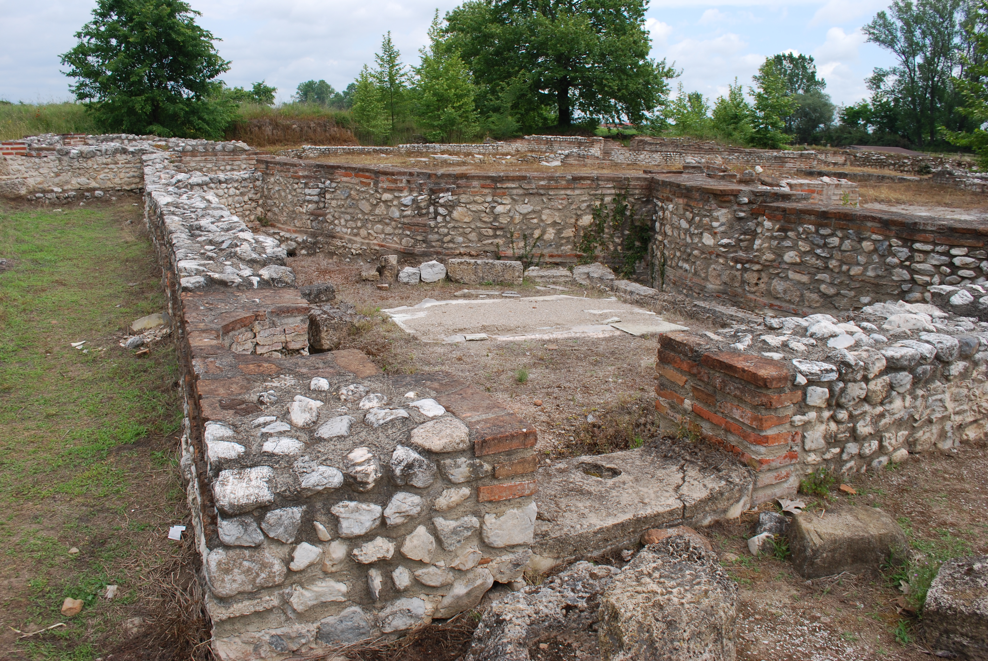 Vue du site archéologique de l'ancienne Dion, au pied du Mont Olympe (Grèce).